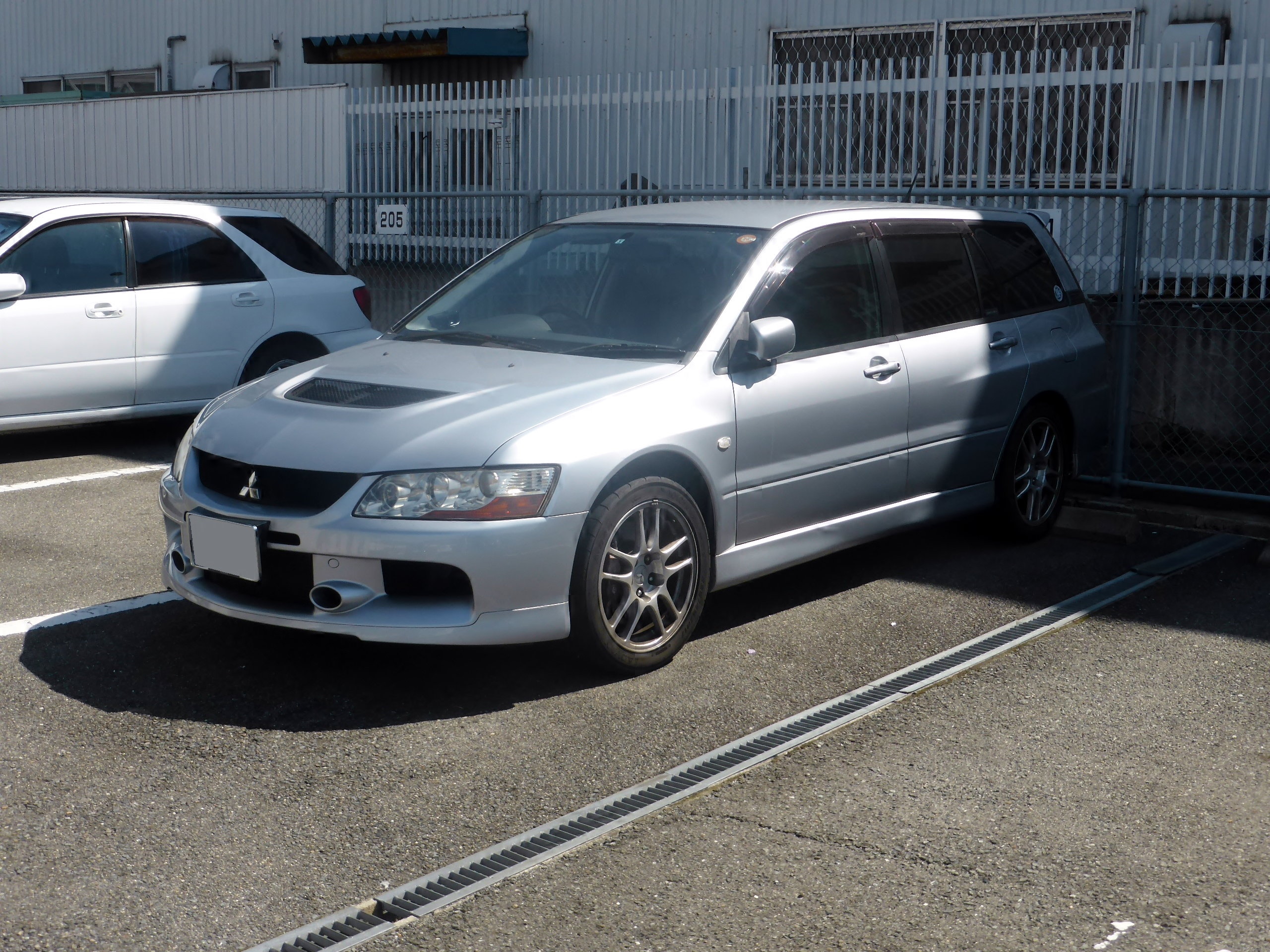 CT9W型三菱・ランサーエボリューションワゴンをフロントから撮影。